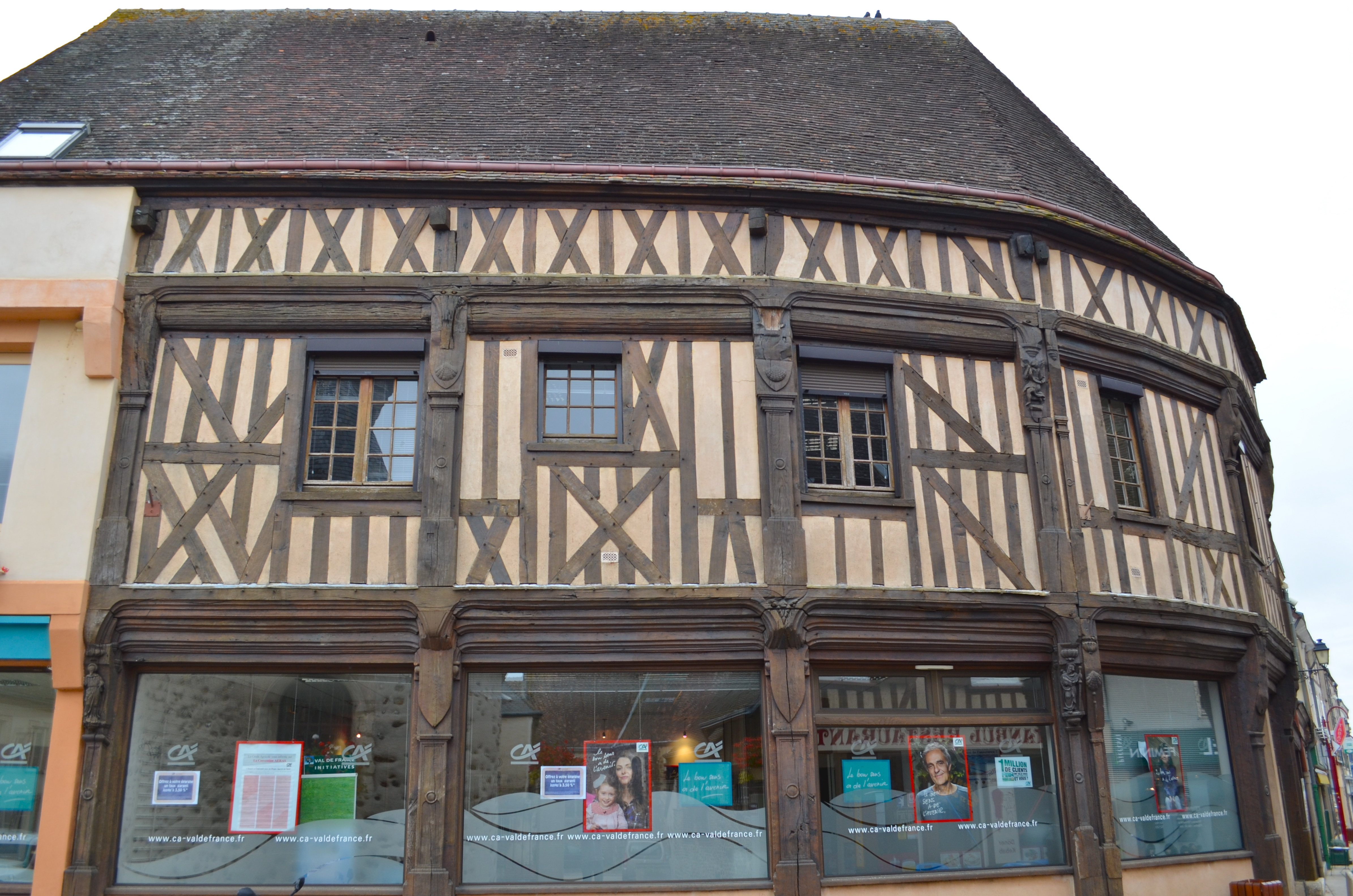 Maison à pans de bois. (Brou, département d'Eure-et-Loir, région Centre).